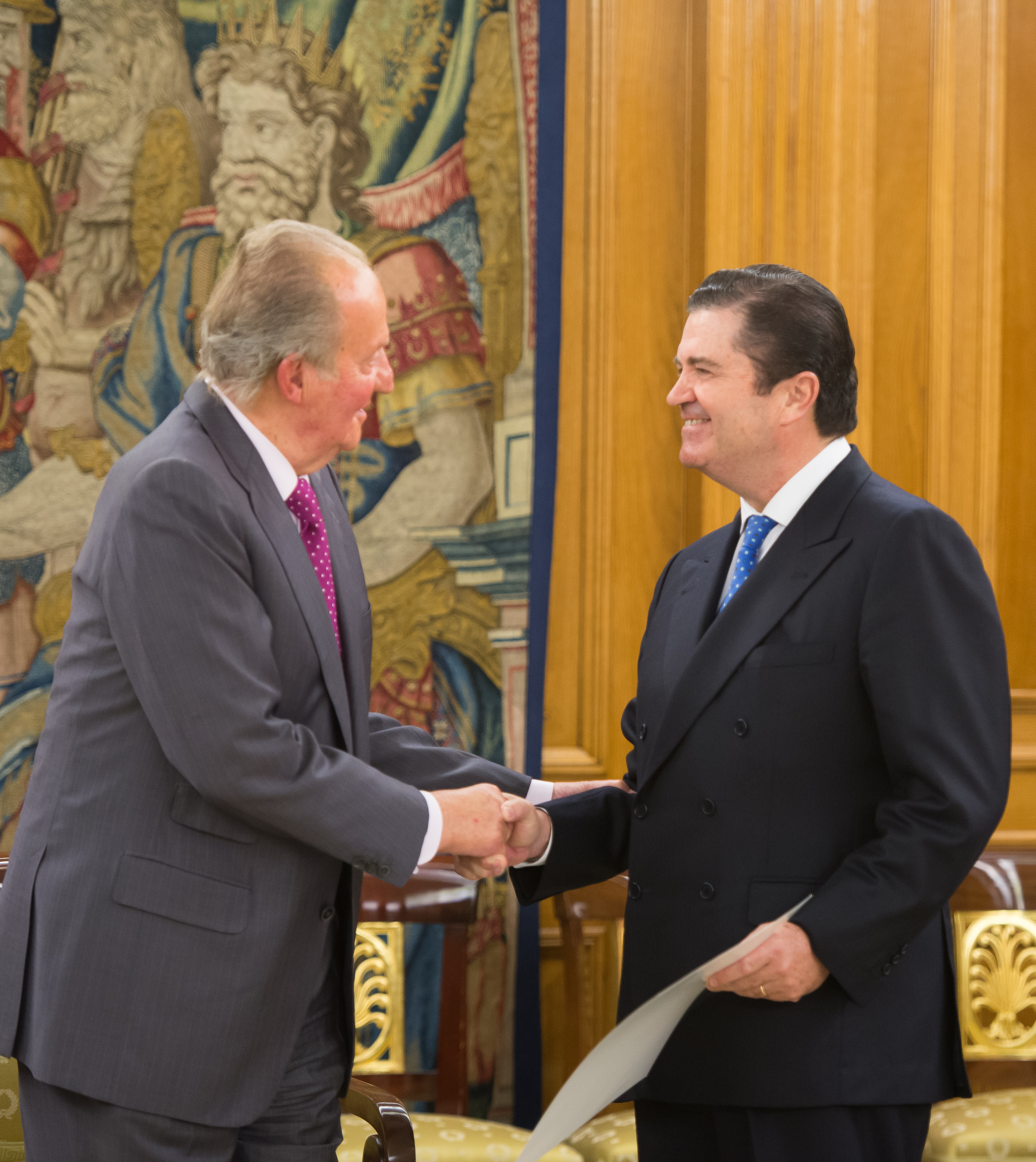 S.A.R el rey Don Juan Carlos entregando el premio Fondena a D. Borja Prado Eulate, presidente de Endesa